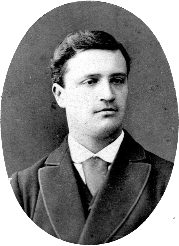 Eusèbe Galmiche en mission en Turquie 1872 Photo propriété famille Galmiche